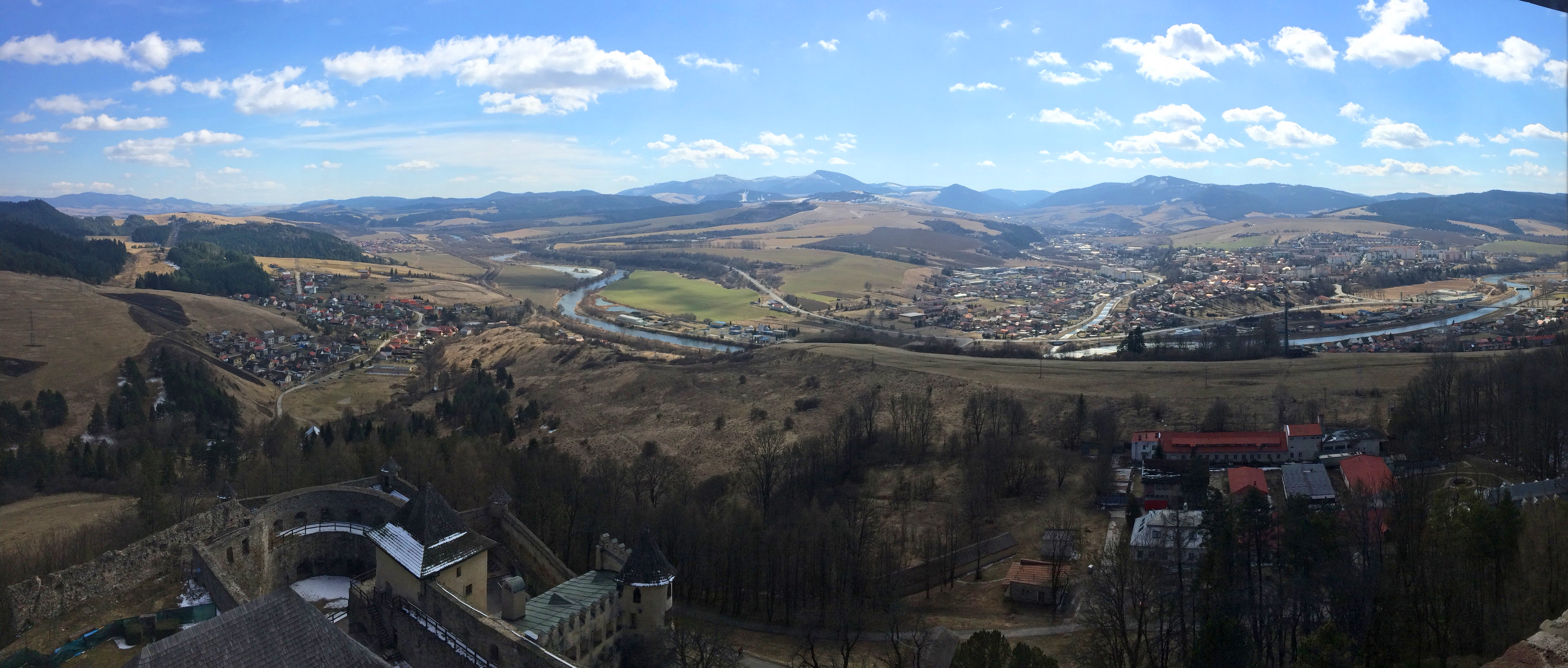 Ľubovnianský hrad - panorama